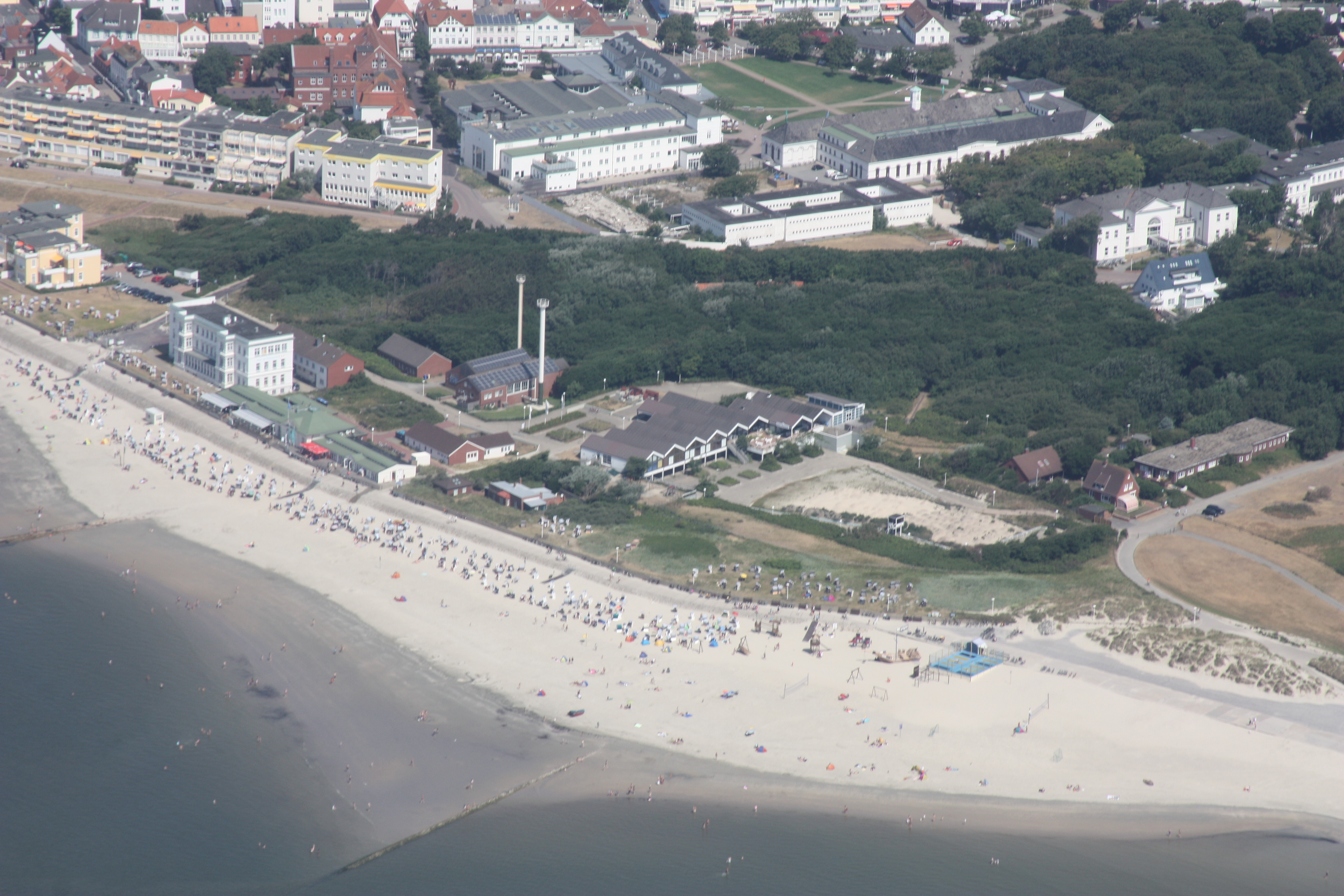 Flug über Norderney - von WEsten kommend, am Nordstran entlang; Flughöhe 500 m = 1500 ft; Juli 2010